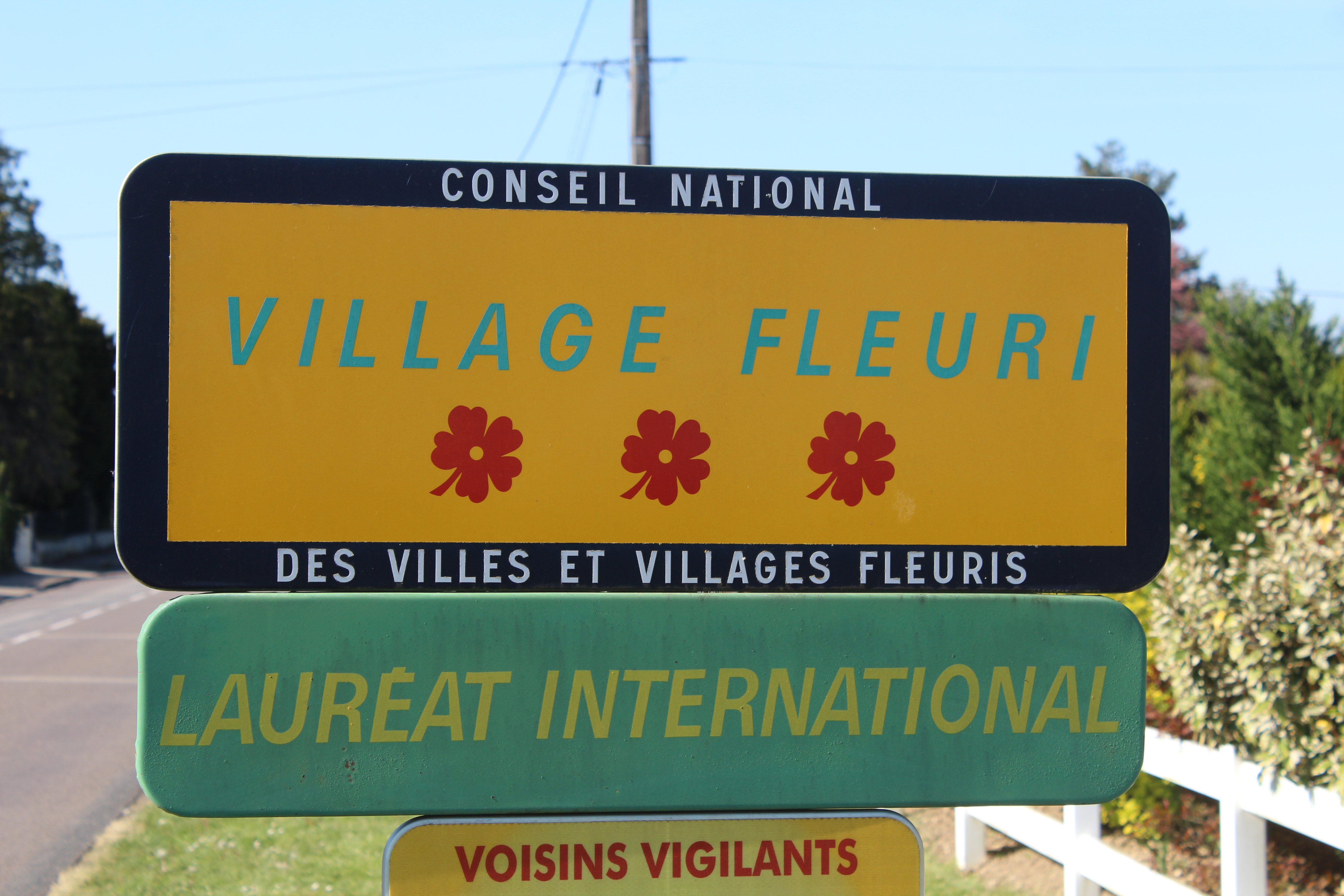 Panneaux Village fleuri avec trois fleurs et du lauréat international à Viriat.